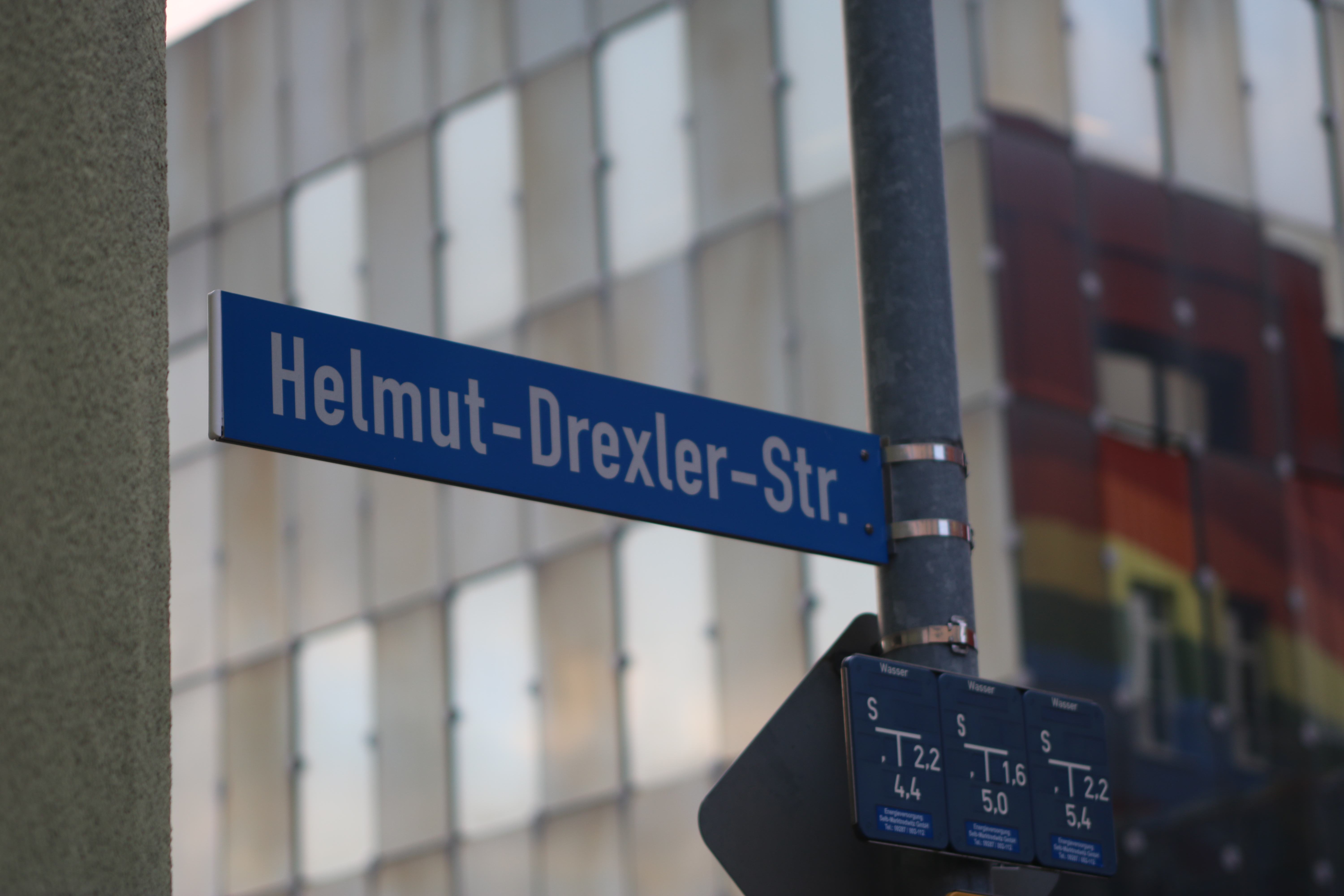 Nach Helmut Drexler benannte Straße in Selb